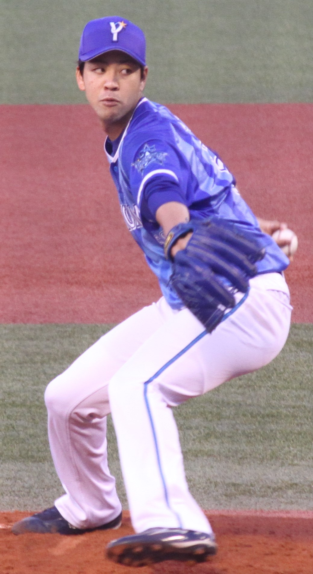 横浜DeNAベイスターズ投手の平良 拳太郎。明治神宮野球場にて